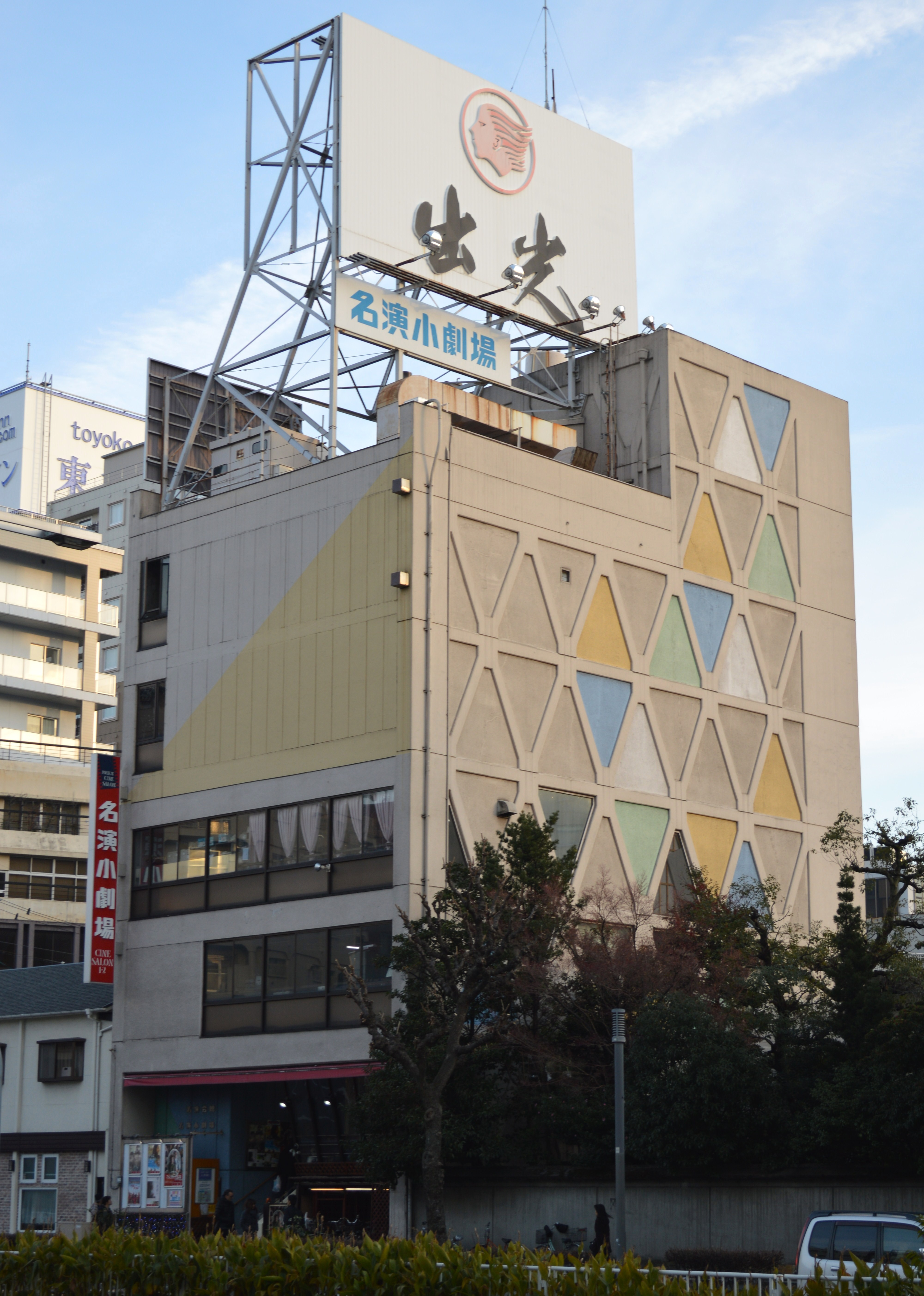 愛知県名古屋市東区東桜にある映画館「名演小劇場」